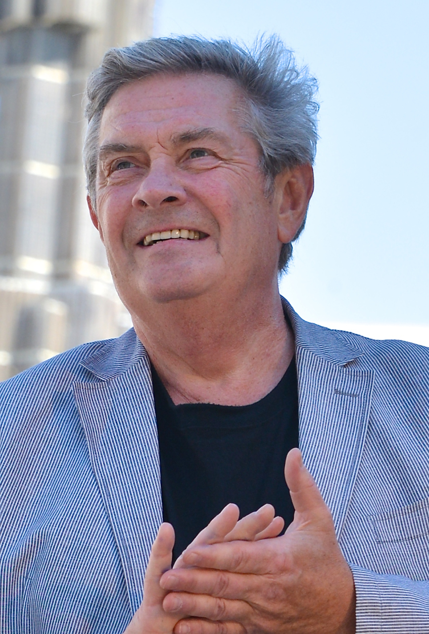 Allan Svensson på Sergels torg under Stockholms Kulturfestival 2013. Smakprover ges ur den kommande säsongens föreställningar på Stockholms Stadsteater.